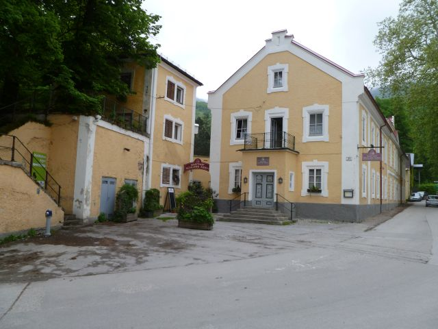 Gasthof Schloss Aigen